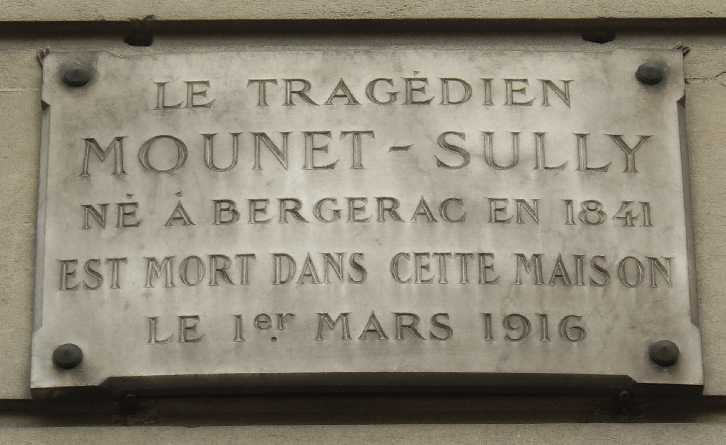 Plaque apposée au n° 1 de la rue Gay-Lussac, Paris 5e, où mourut le tragédien Mounet-Sully (1841-1916) le 1er mars 1916.